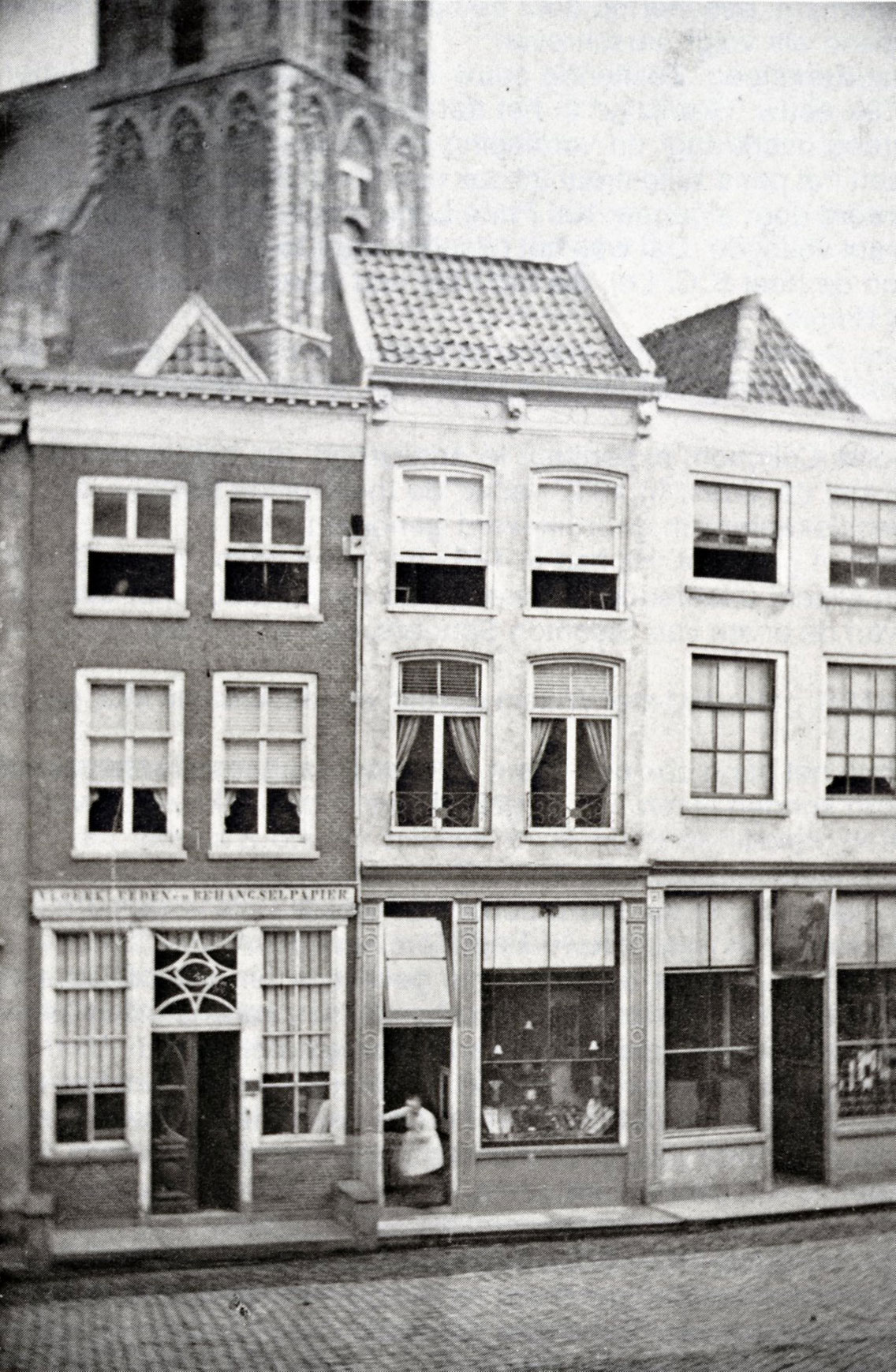 Wijdstraat v.l.n.r. 24, 22 en 20 Gouda, rijksmonument, foto omstreeks 1867